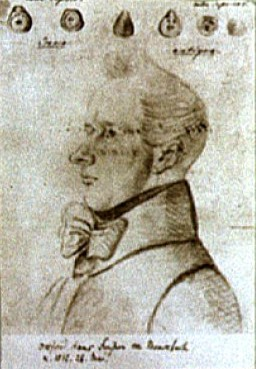 Hans Freiherr von Meusebach (1812-1897) in jungen Jahren andere Versionen: Otfried-Hans-Meusebach.jpg